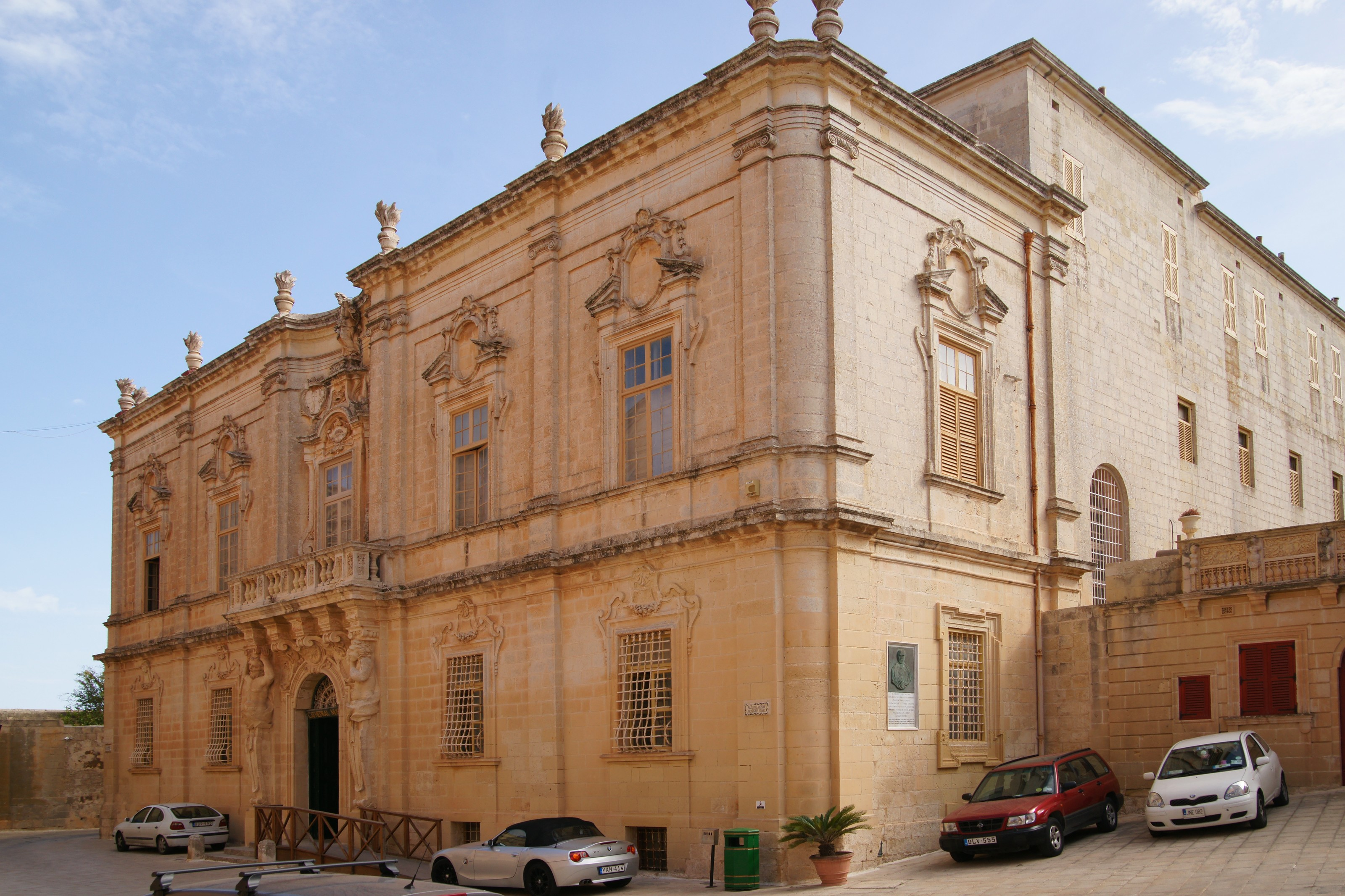 Cathedral Museum